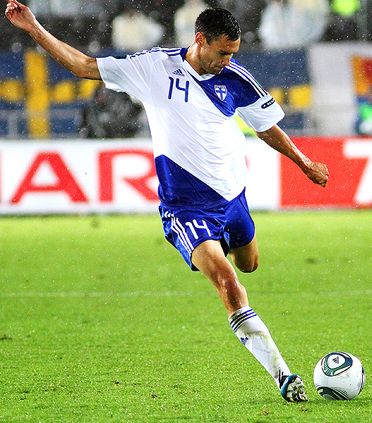 Tim Sparv